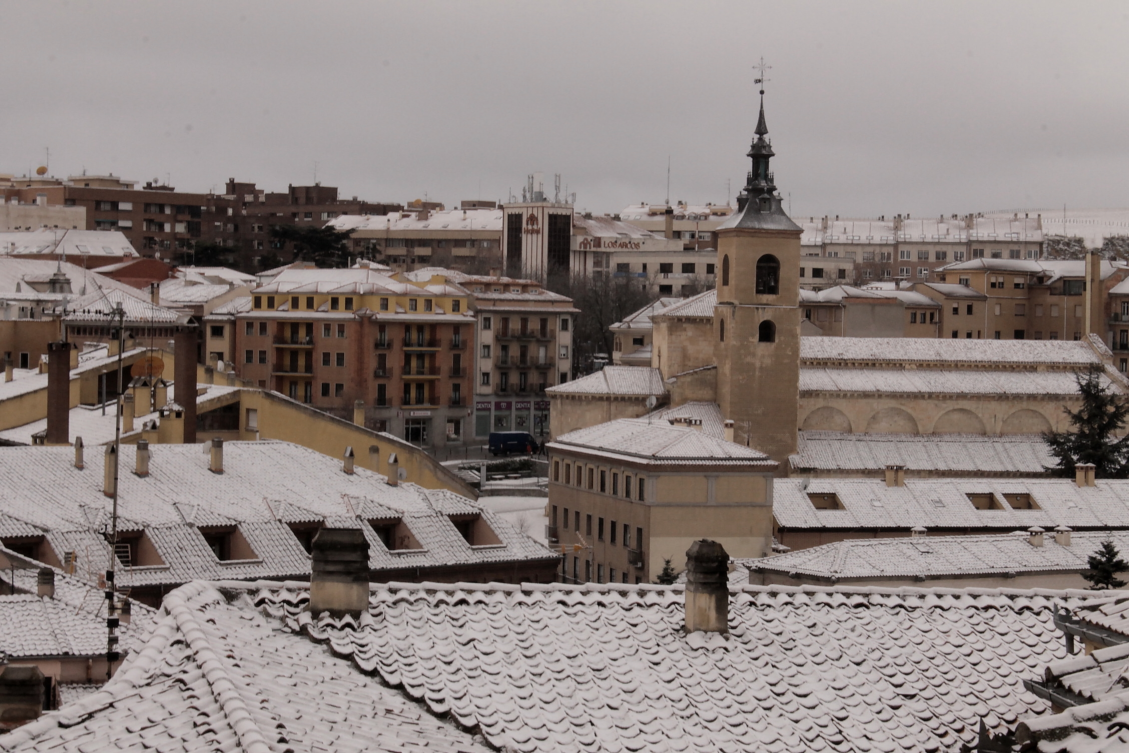 Segovia nevada 2015 012